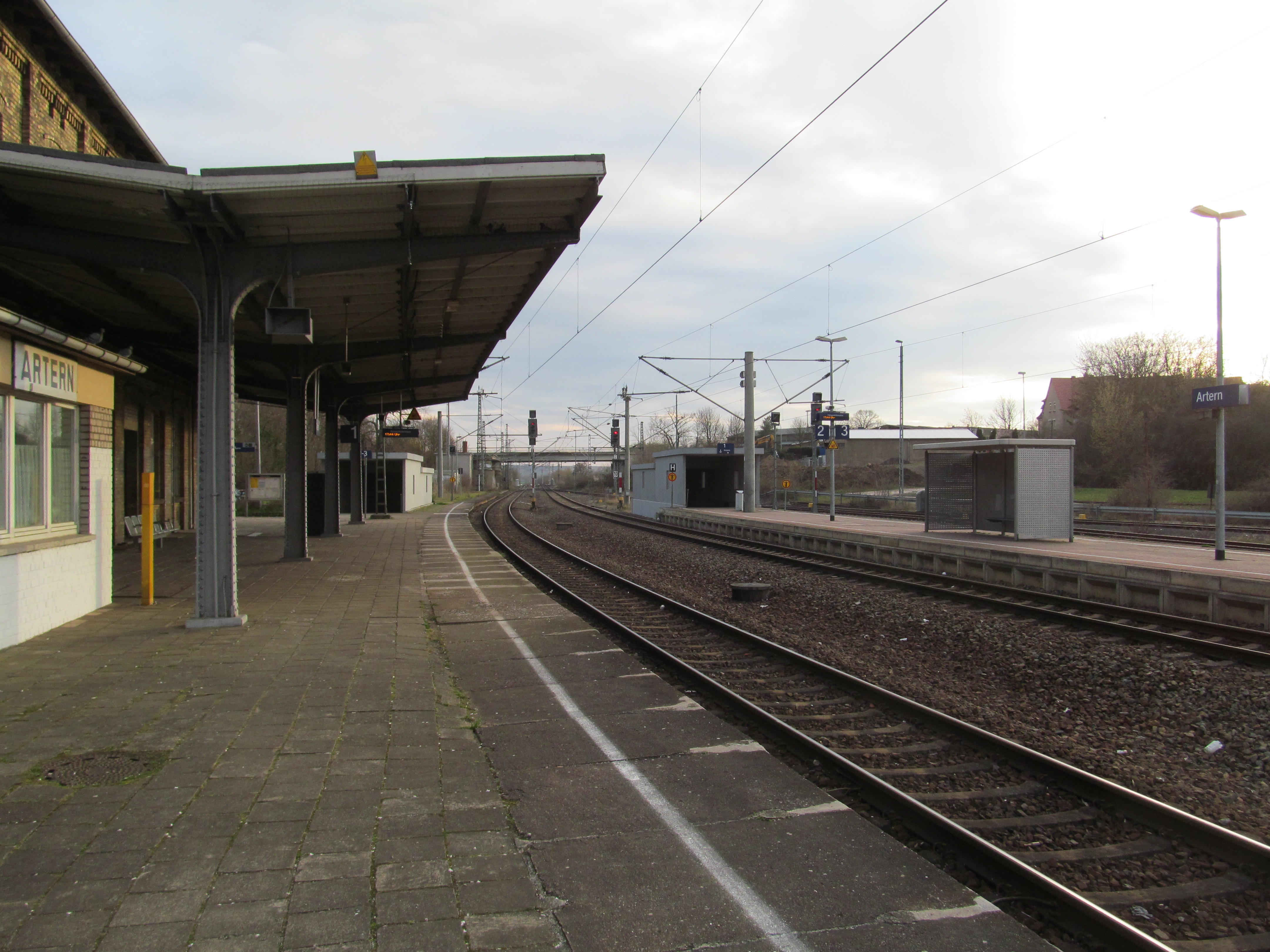 Bahnanlagen im Bahnhof Artern